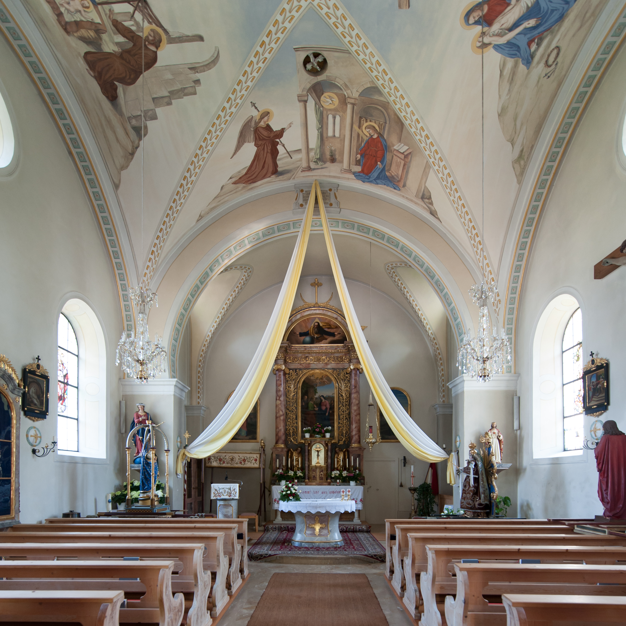 Wiki takes Nordtiroler Oberland: Kirche Mariae Heimsuchung in Haimingerberg